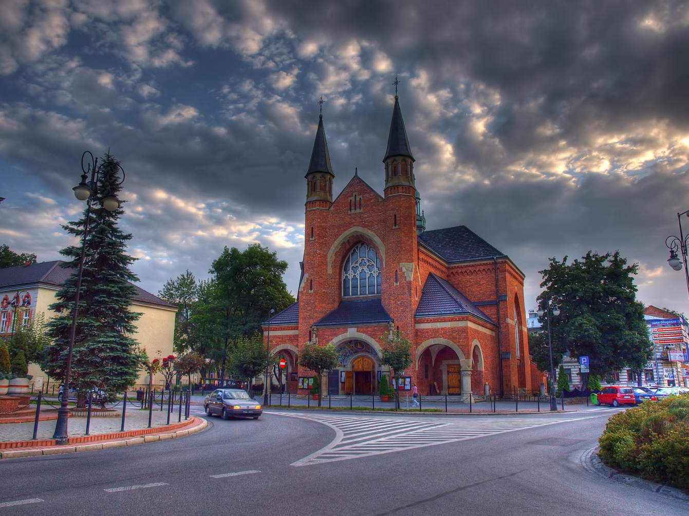 Nowy Sącz ul. Długosza 3